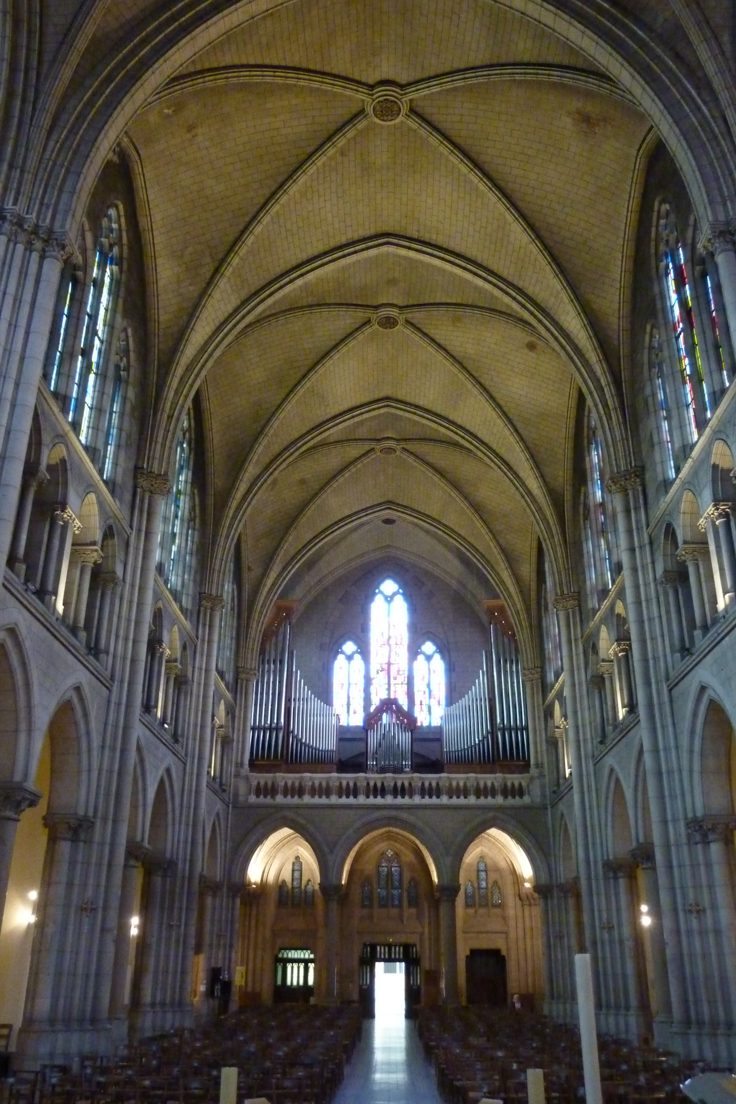 Katholische Pfarrkirche Notre-Dame-du-Perpétuel-Secours im 11. Arrondissement von Paris, Innenansicht mit Blick zur Orgelempore